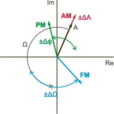 Fázorový diagram se znázorněním spojitých modulací AM, FM a PM